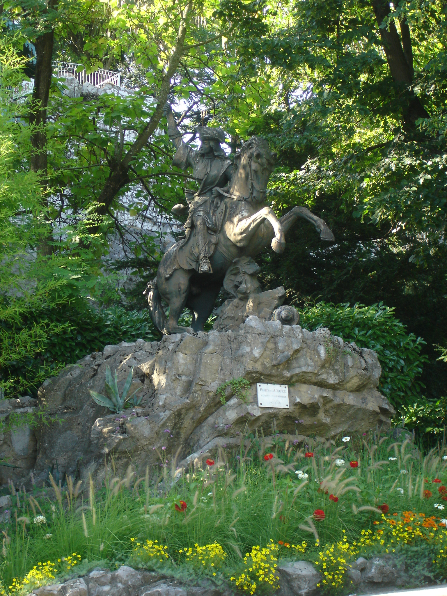 Philis de la Charce, Jardin des dauphins, Grenoble